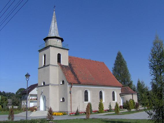 Kościół w Pludrach